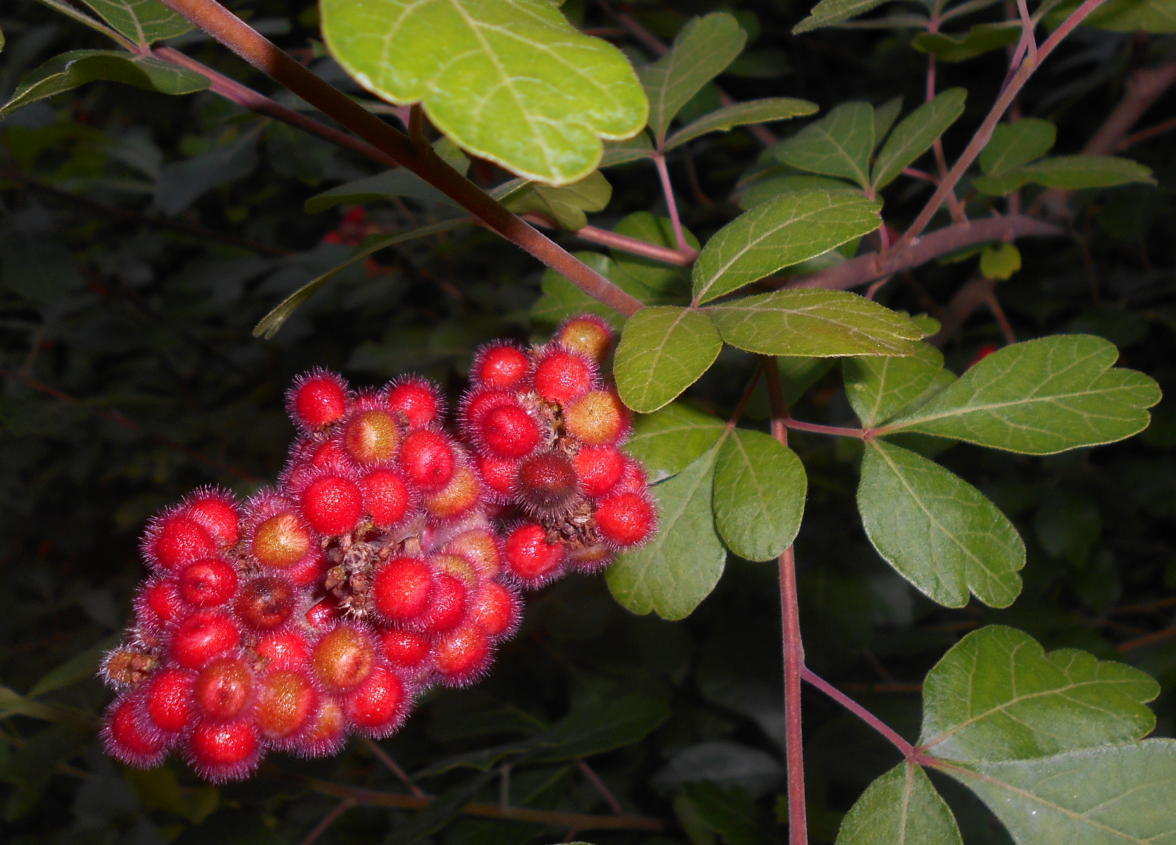 Sumak aromatyczny (Rhus aromatica), Ogród Botaniczny UMCS w Lublinie